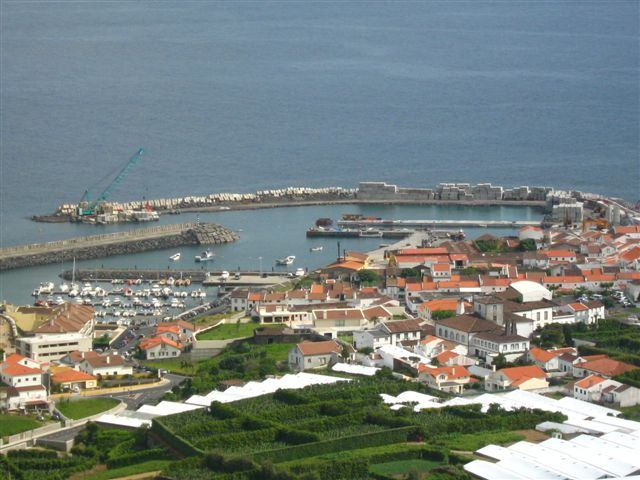 Porto e Marina de Vila Franca do Campo, ilha de São Miguel, Arquipélago dos Açores